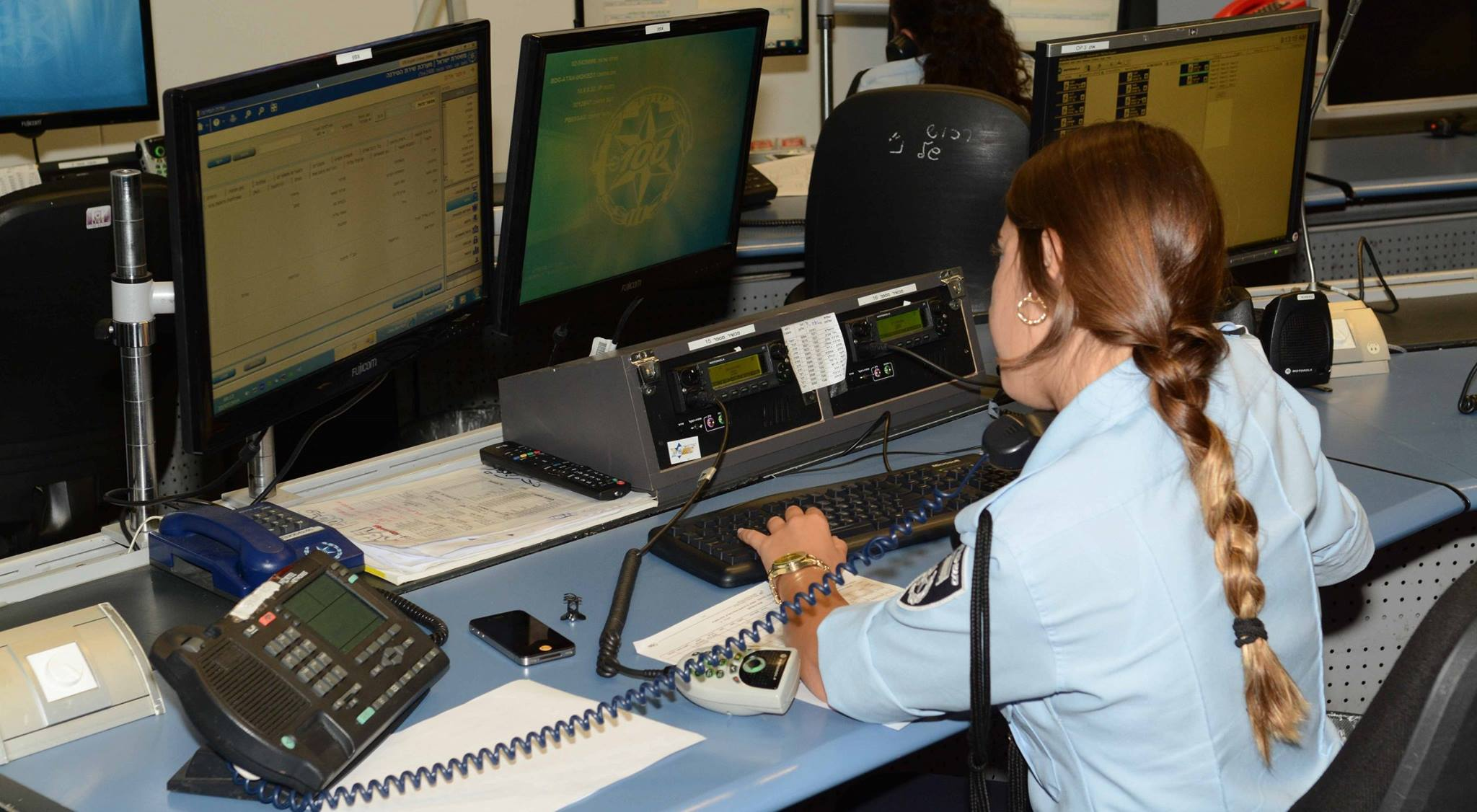 מוקד חירום משטרתי